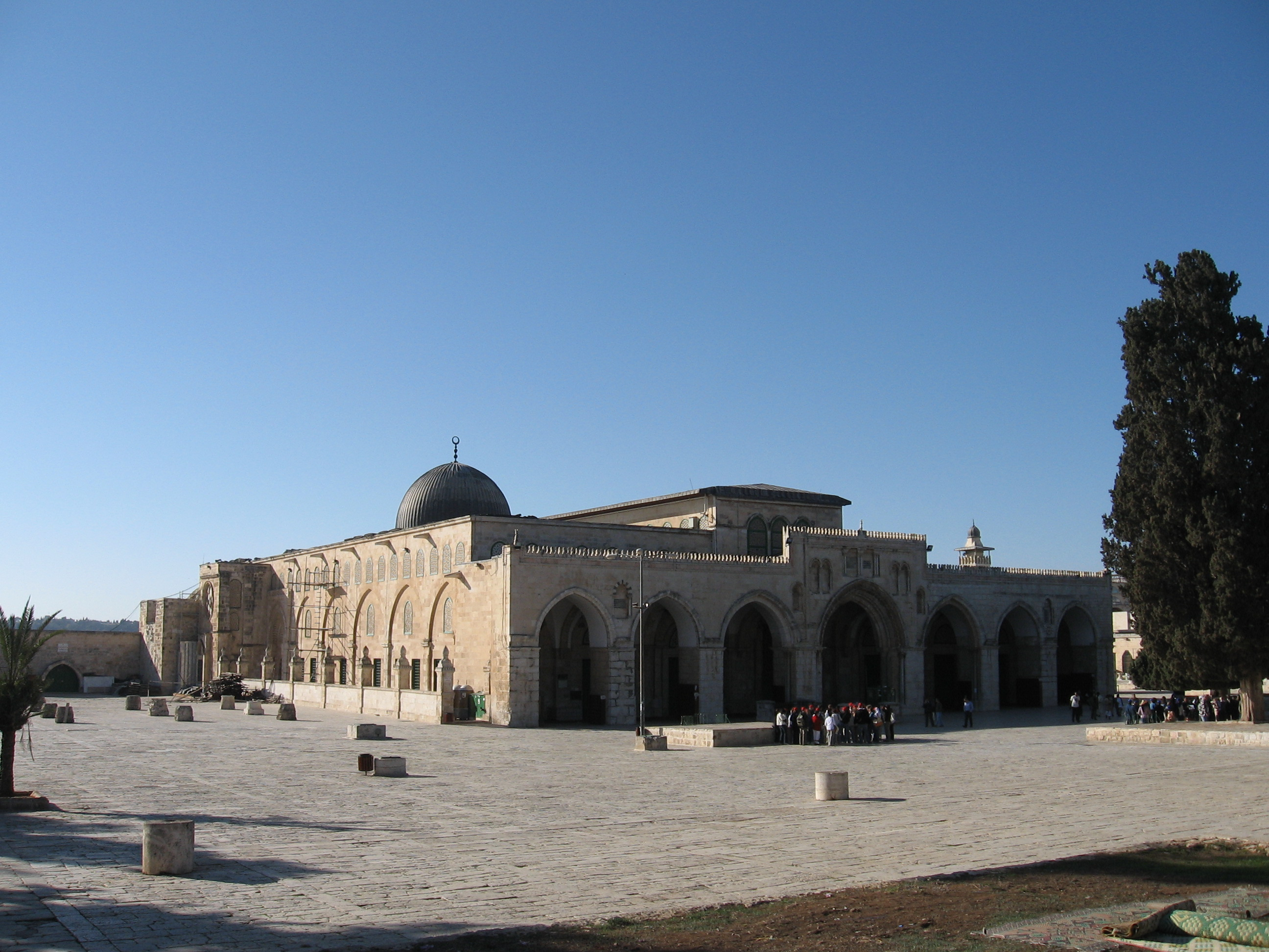 DienAl_Aksa Moschee